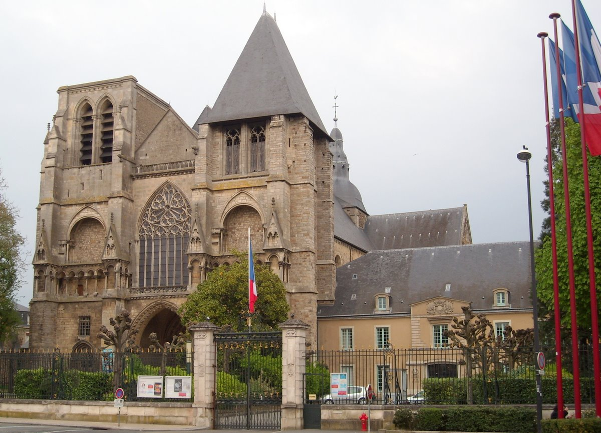 Église Notre-Dame de la Couture et son ancienne abbaye devenue préfecture de la Sarthe